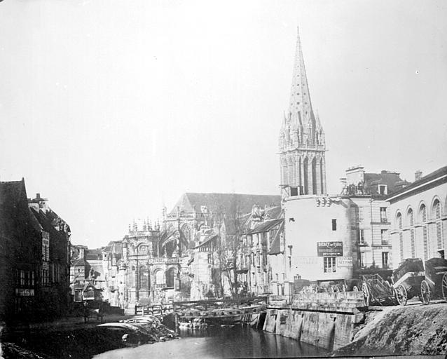 Quais de l'Odon à Caen avant que la rivière soit recouverte pour former les actuels boulevards des Alliés et Maréchal Leclerc.